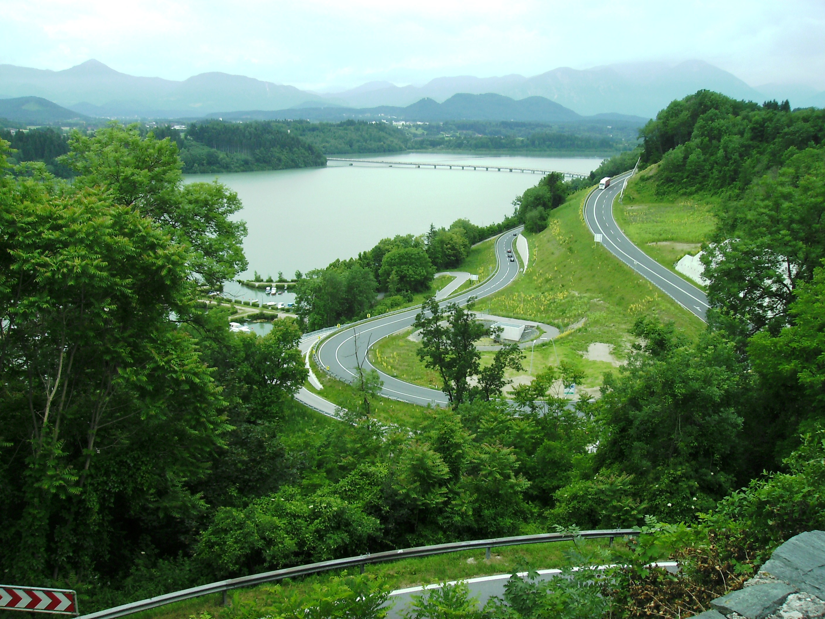 Blick von Völkermarkt auf den Stausee und die Zufahrtsstraße